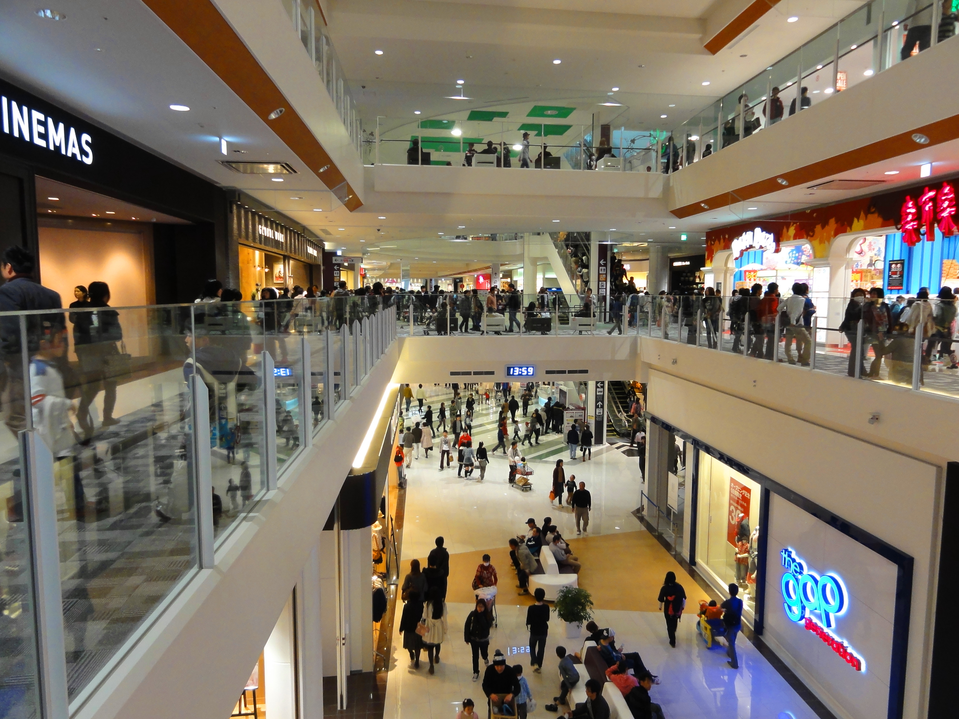 イオンモール甲府昭和の店内。Panoramioより転載。